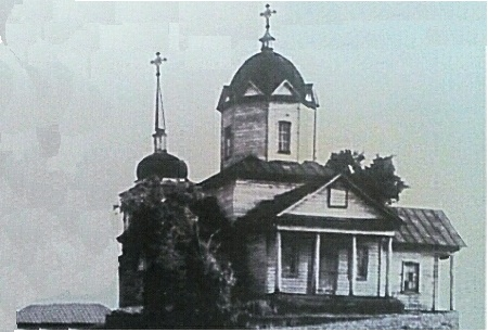 Церковь Рождества Богородицы, разрушена в 1980 году